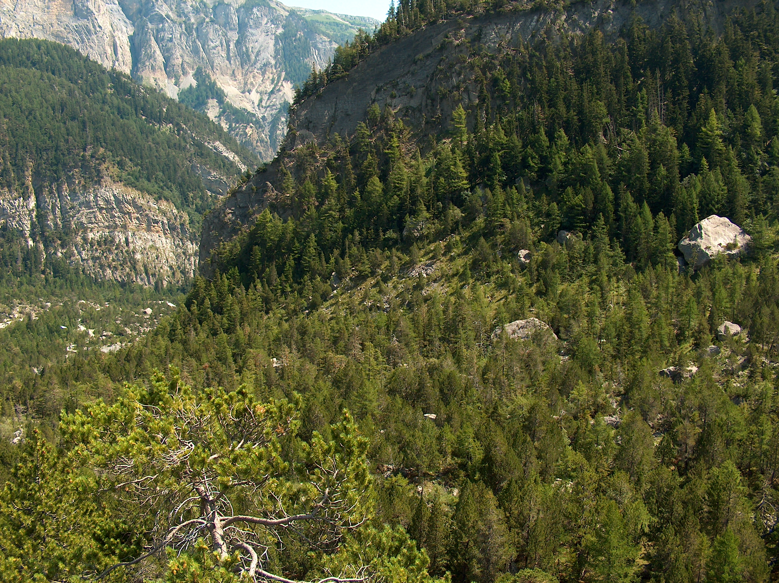 near Lac de Deborence